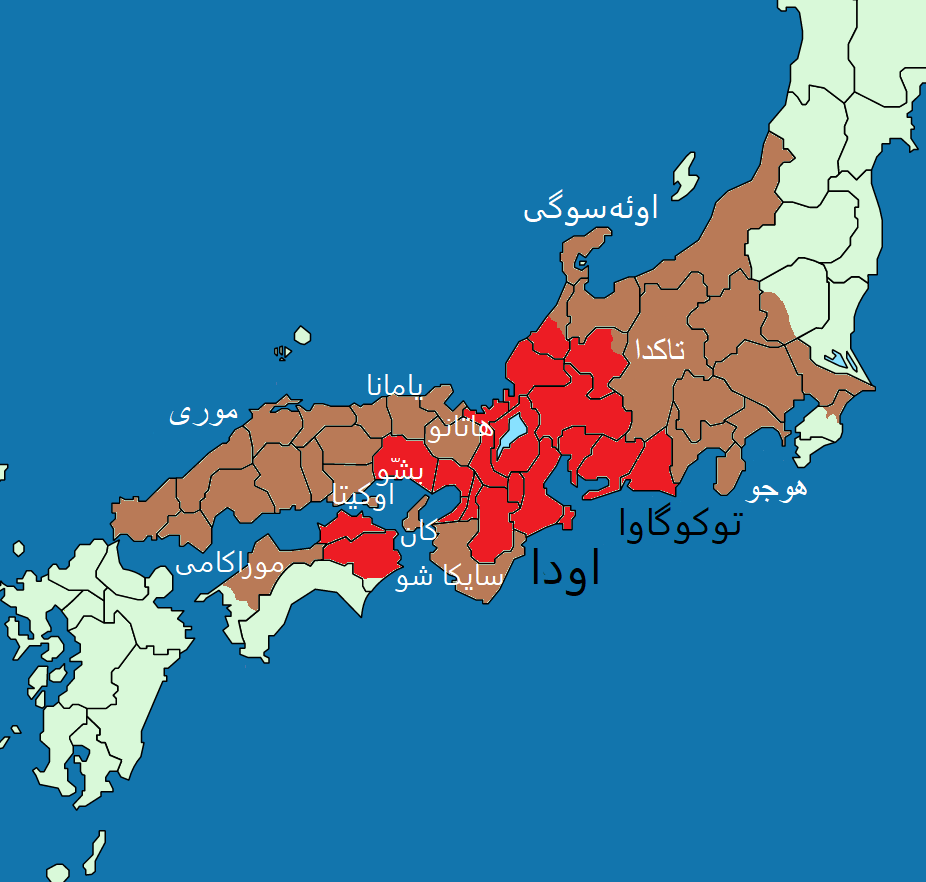 map of Sengoku period 1576